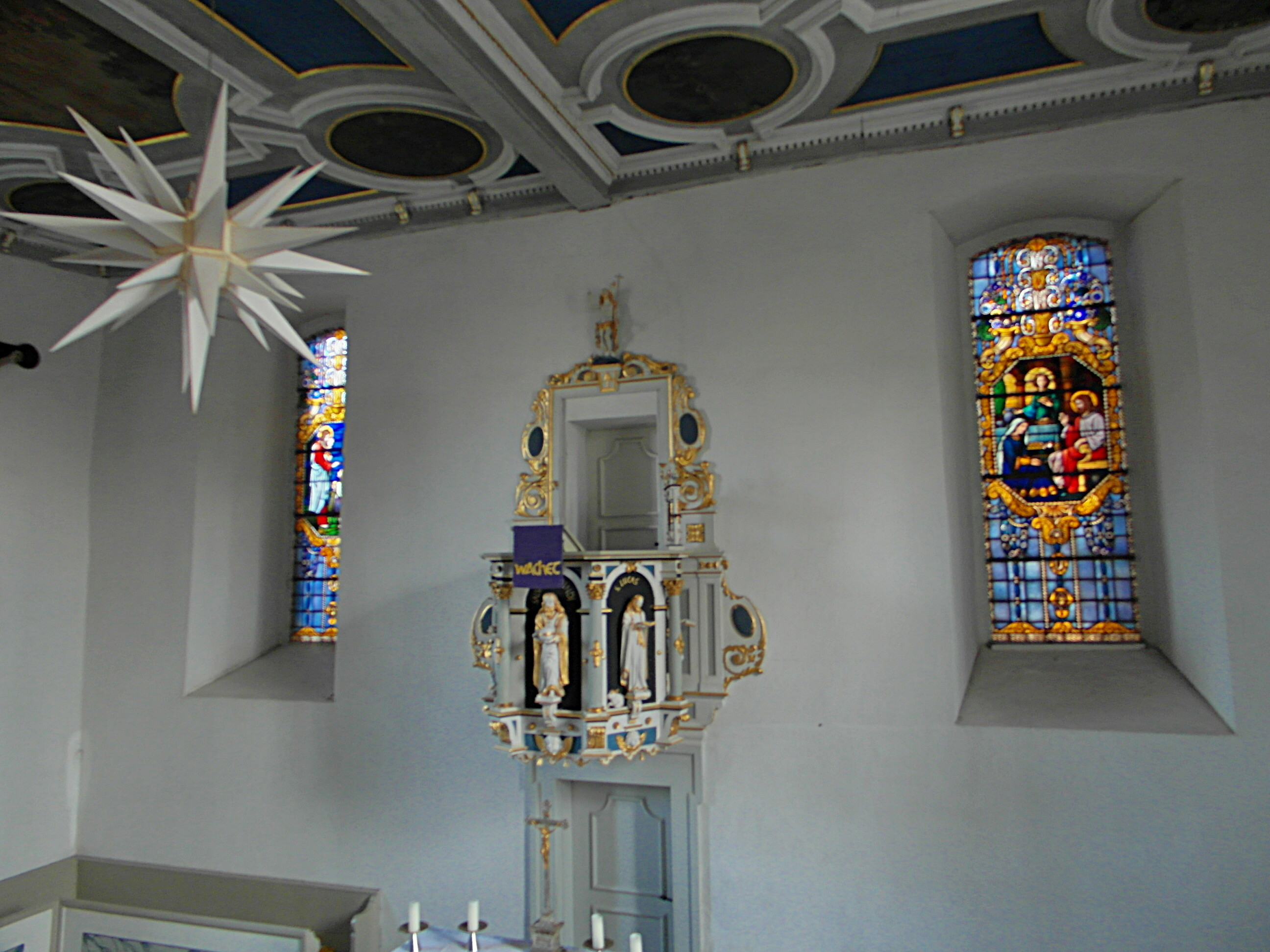 Altarraum der Christophoruskirche (Saara)